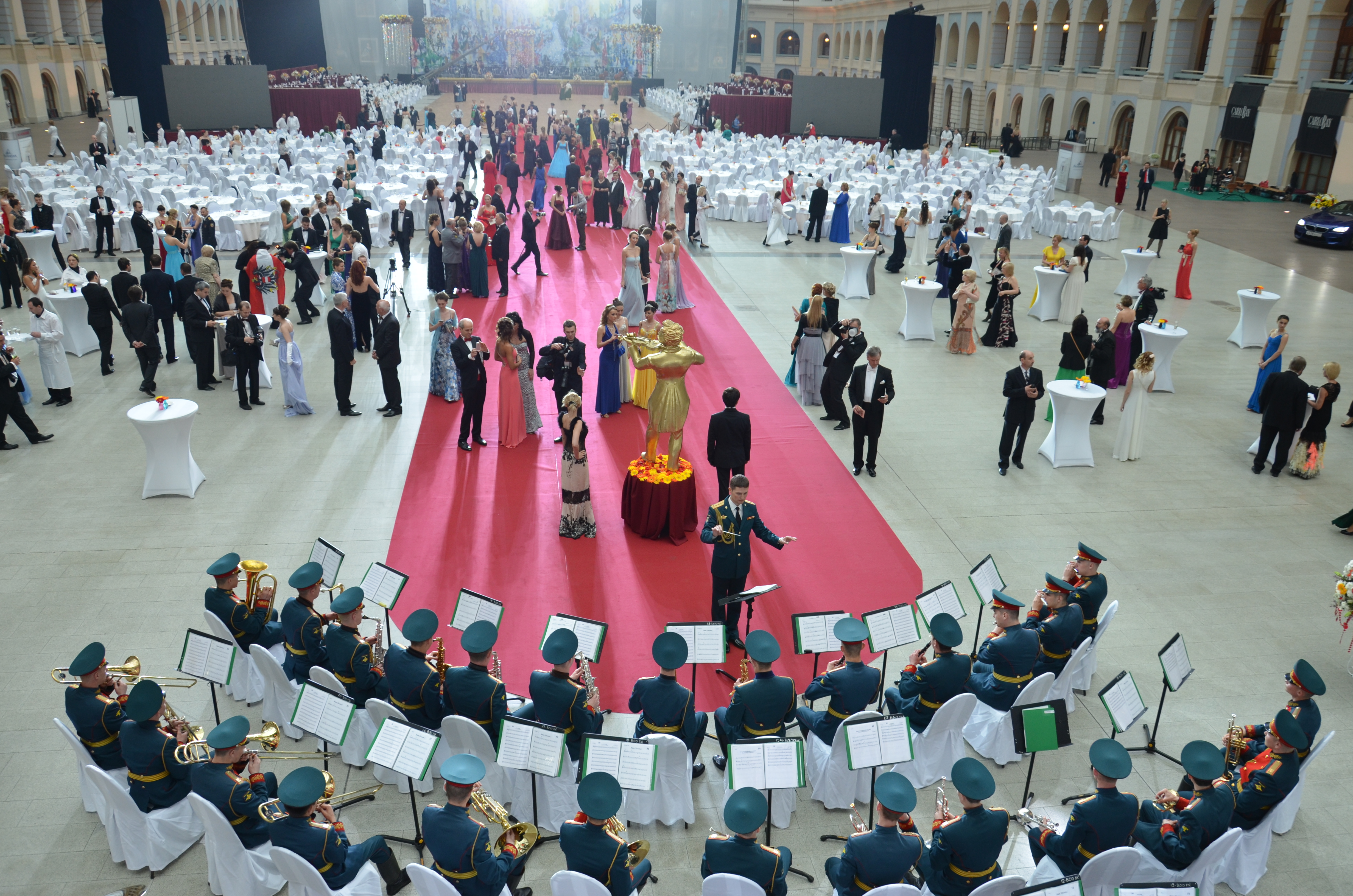 Венский бал 2013